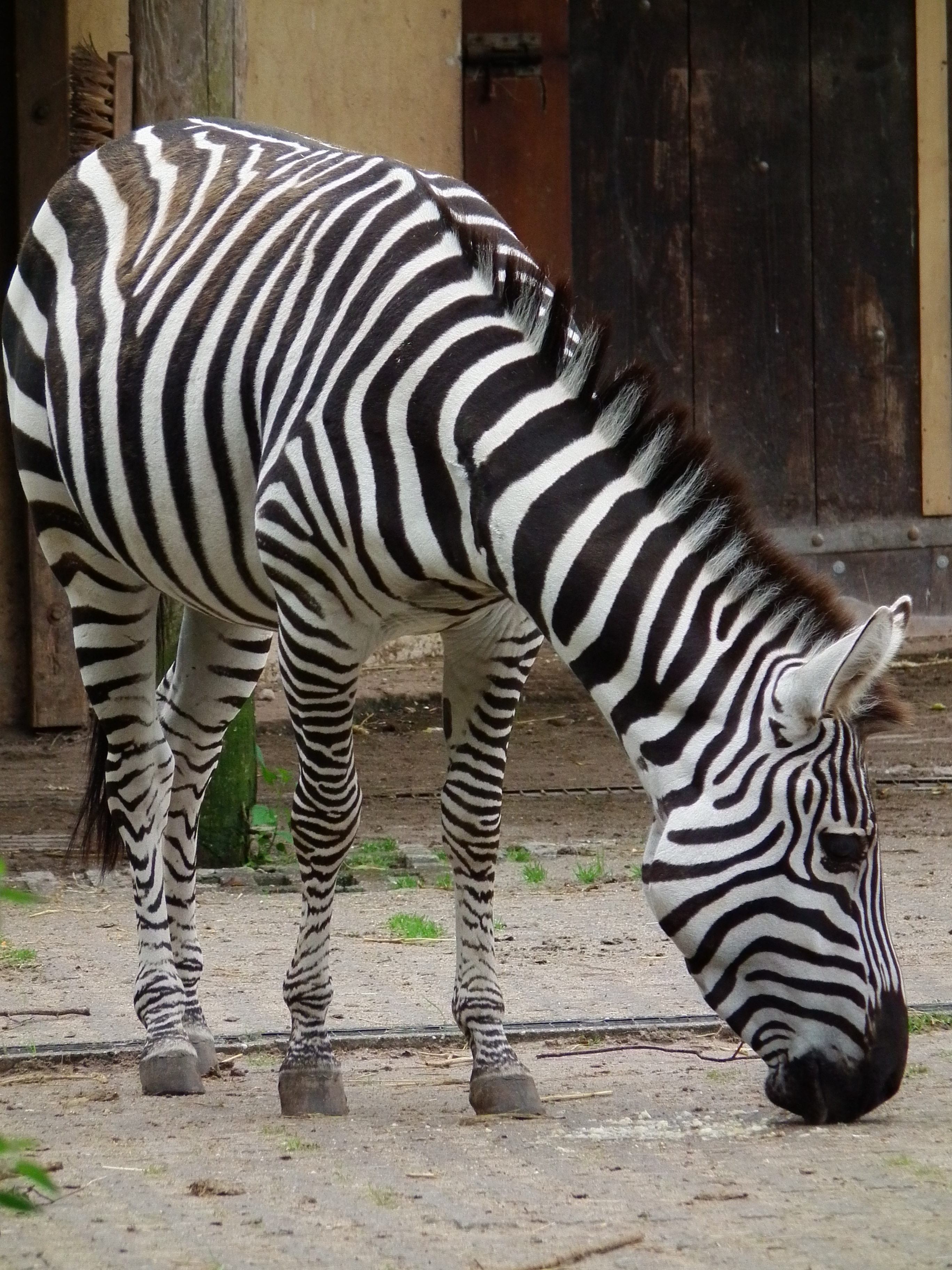 Böhm-Zebra (Equus quagga boehmi) im Vivarium Darmstadt (Hessen, Deutschland)